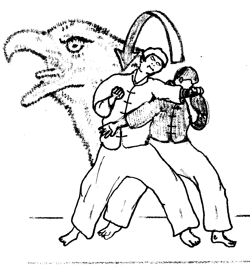 aigle3